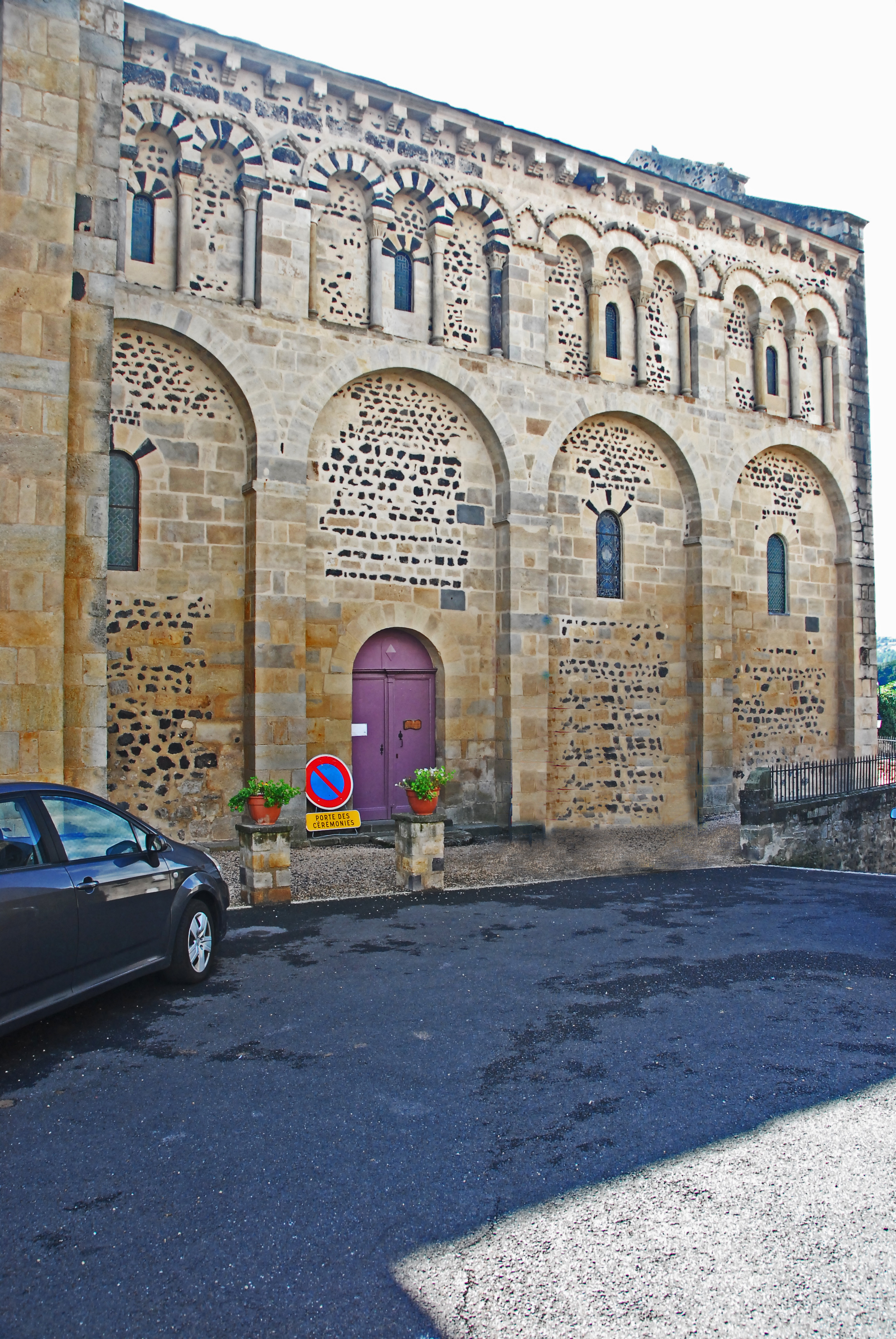 St-Saturnin (Puy-de-Dôme), Langhaus von N